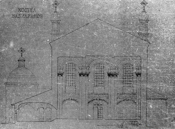 Беларуская (тарашкевіца): Вільня (Vilnia), вуліца Вастрабрамская (vulica Vastrabramskaja). Царква Сьвятой Тройцы